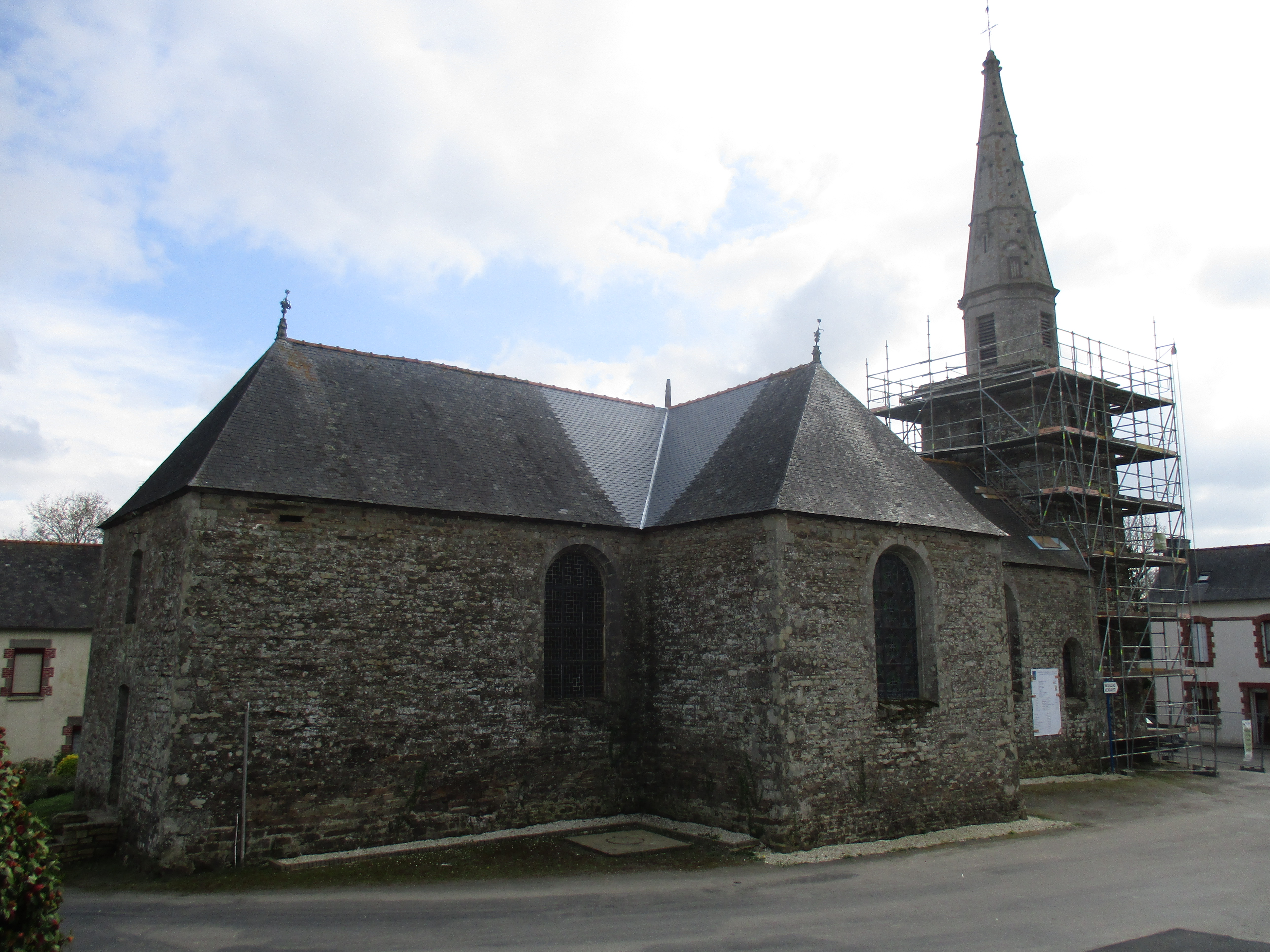 L'Église Saint-Gonéry de Saint-Connec (22)